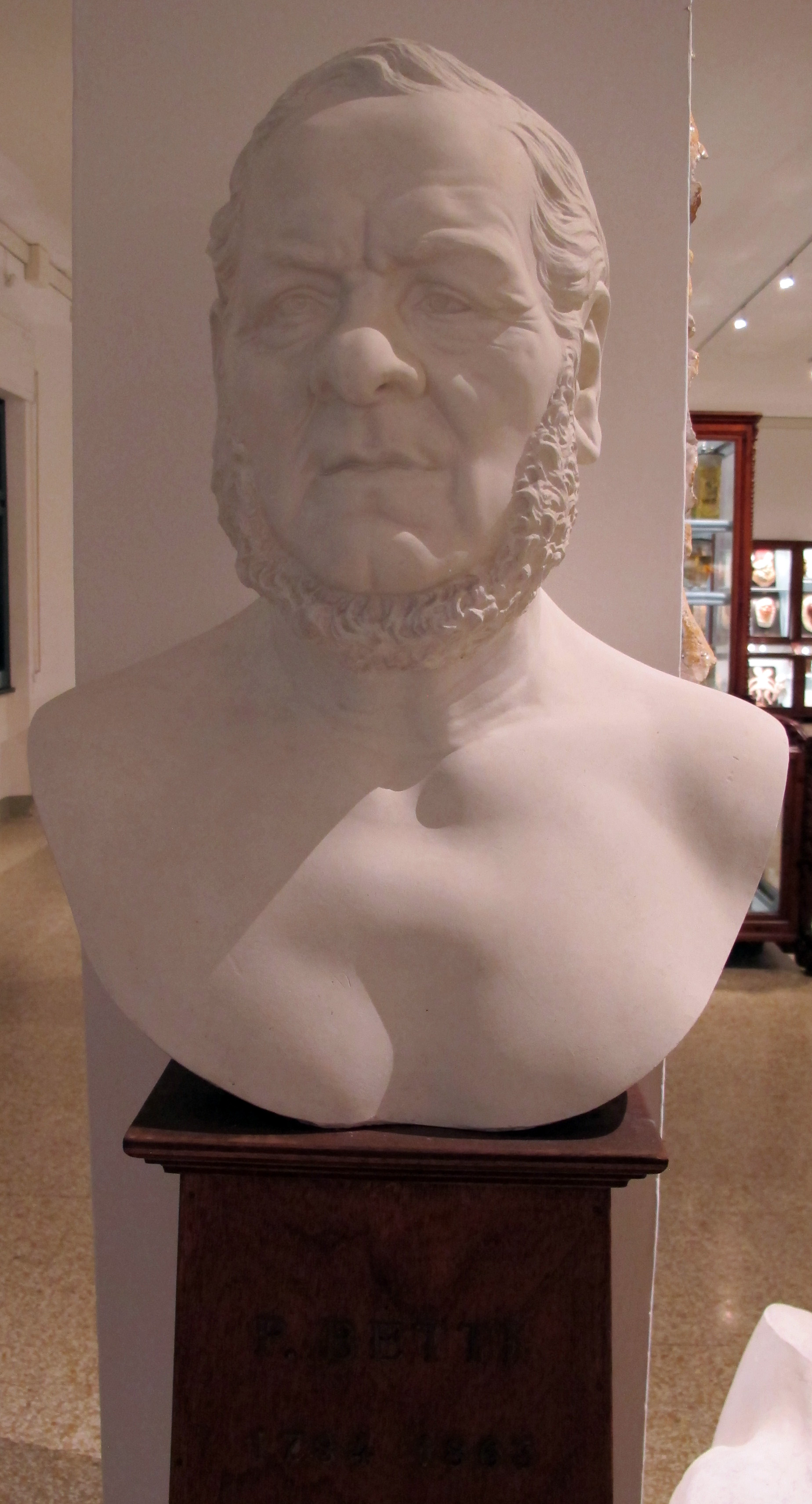 Istituto di anatomia patologica, museo, busto pietro betti